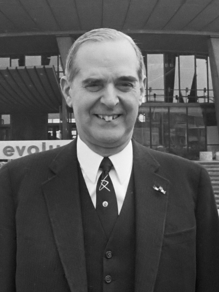 Ir. F. Philips voor het Evoluon te Eindhoven